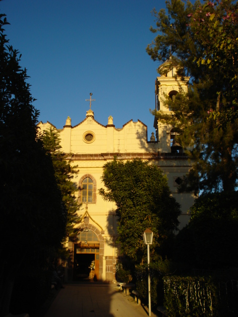 Cardenas San Luis Potosi Mexico.